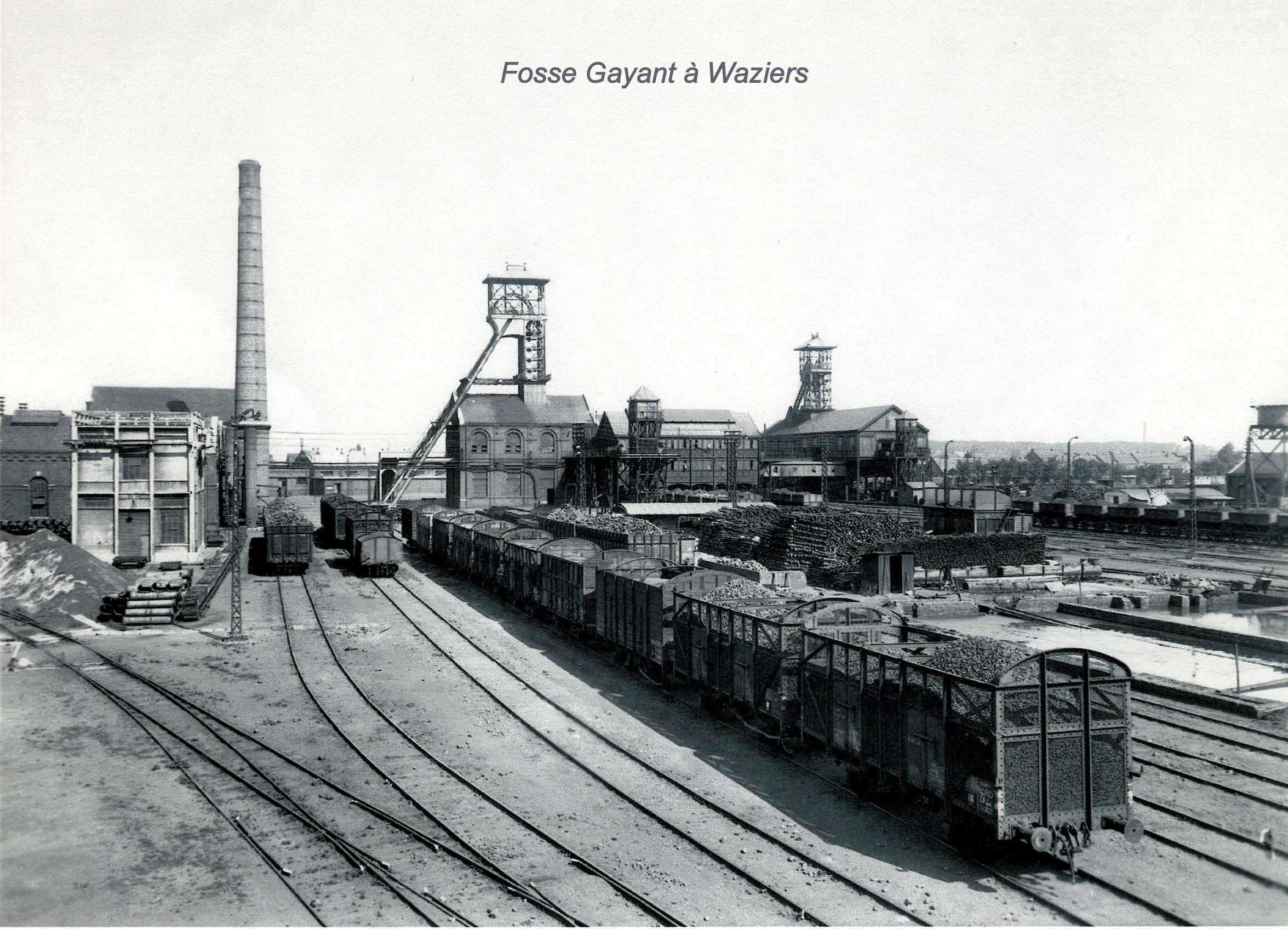 Fosse gayant à Waziers de la Cie des mines d'Aniche